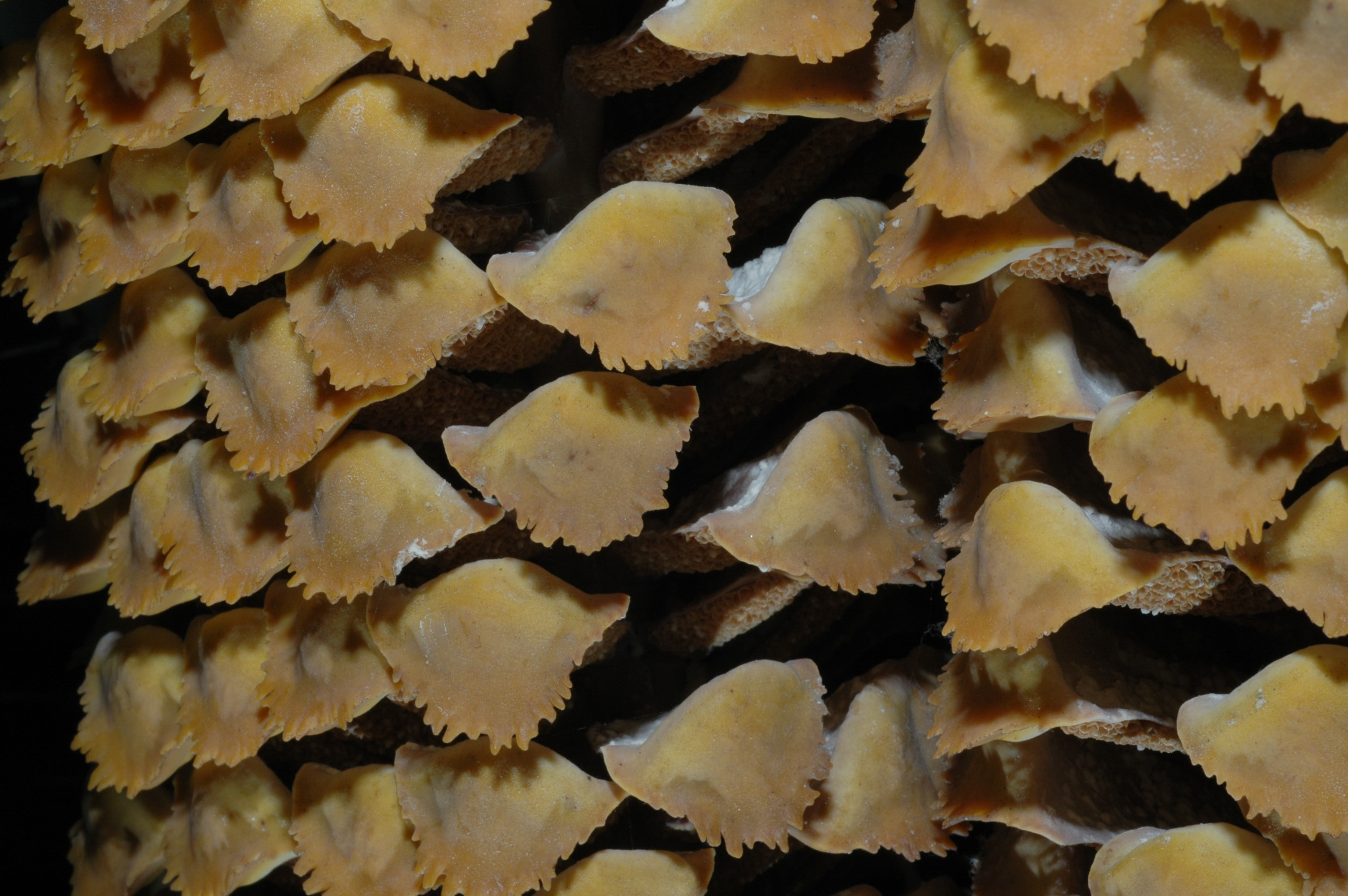 Con apropat d'Encephalartos senticosus al Jardí botànic de Barcelona.